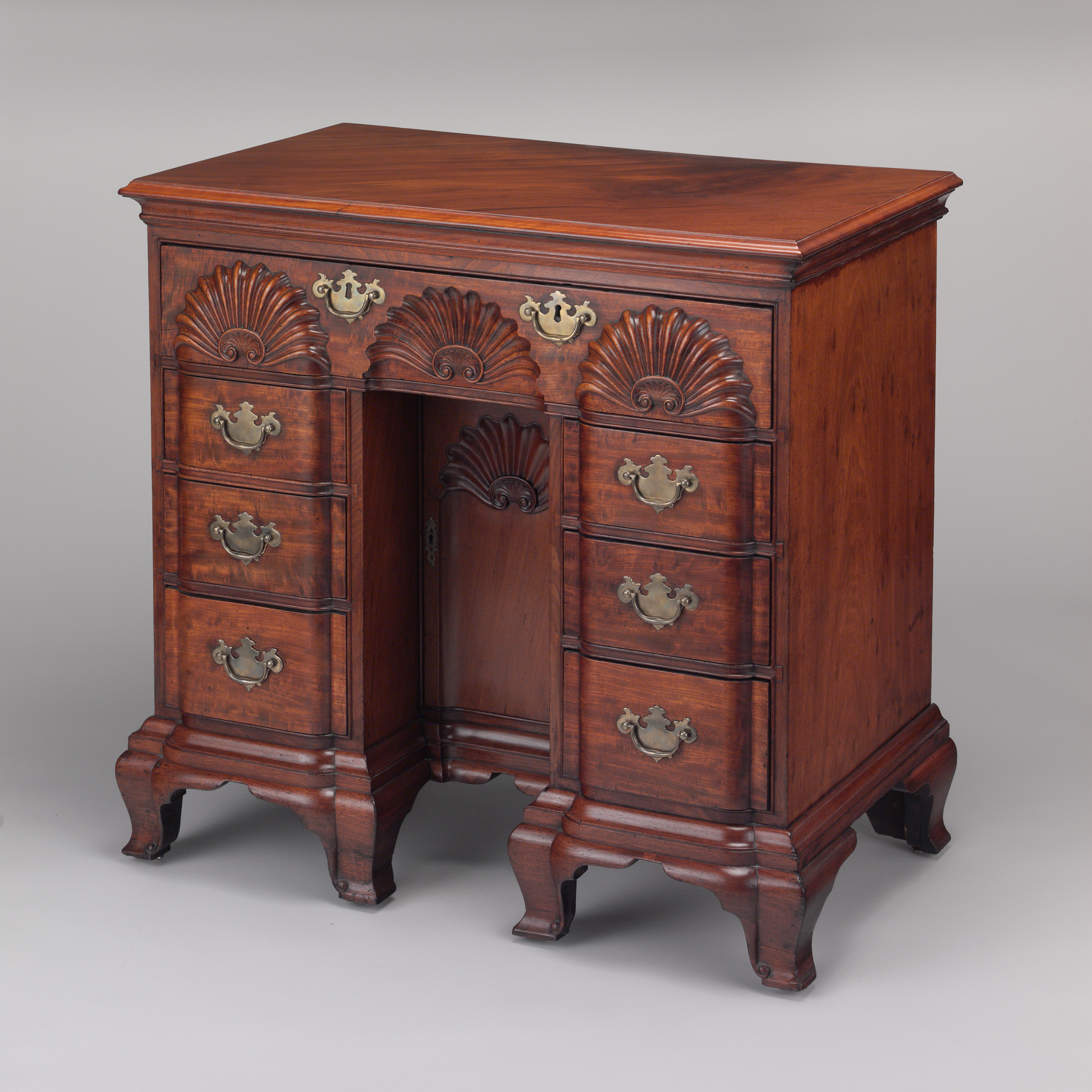 American; Bureau table; Furniture